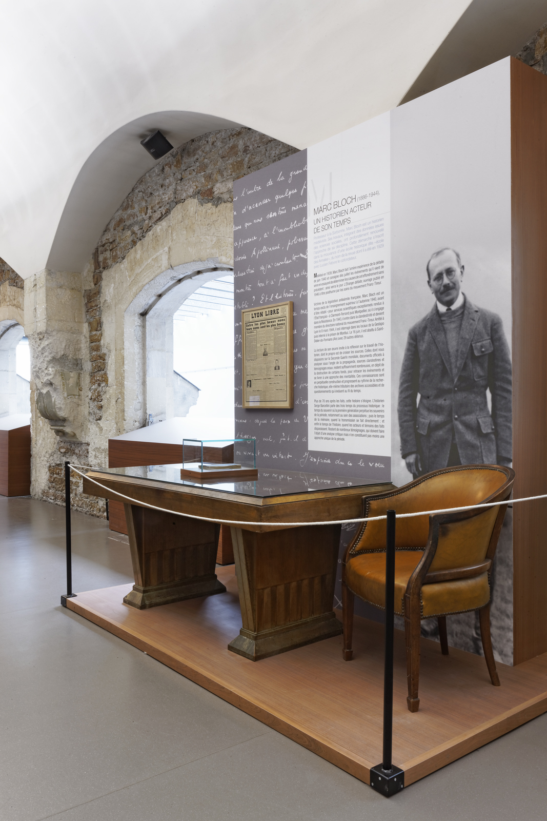 Éléments du mobilier de bureau de Marc Bloch exposés au Centre d'Histoire de la Résistance et de la Déportation.